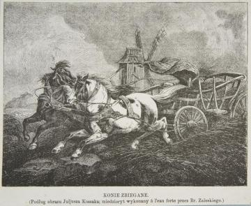 Konie zbiegane wg obrazu Juliusza Kossaka rysował Bronisław Zaleski